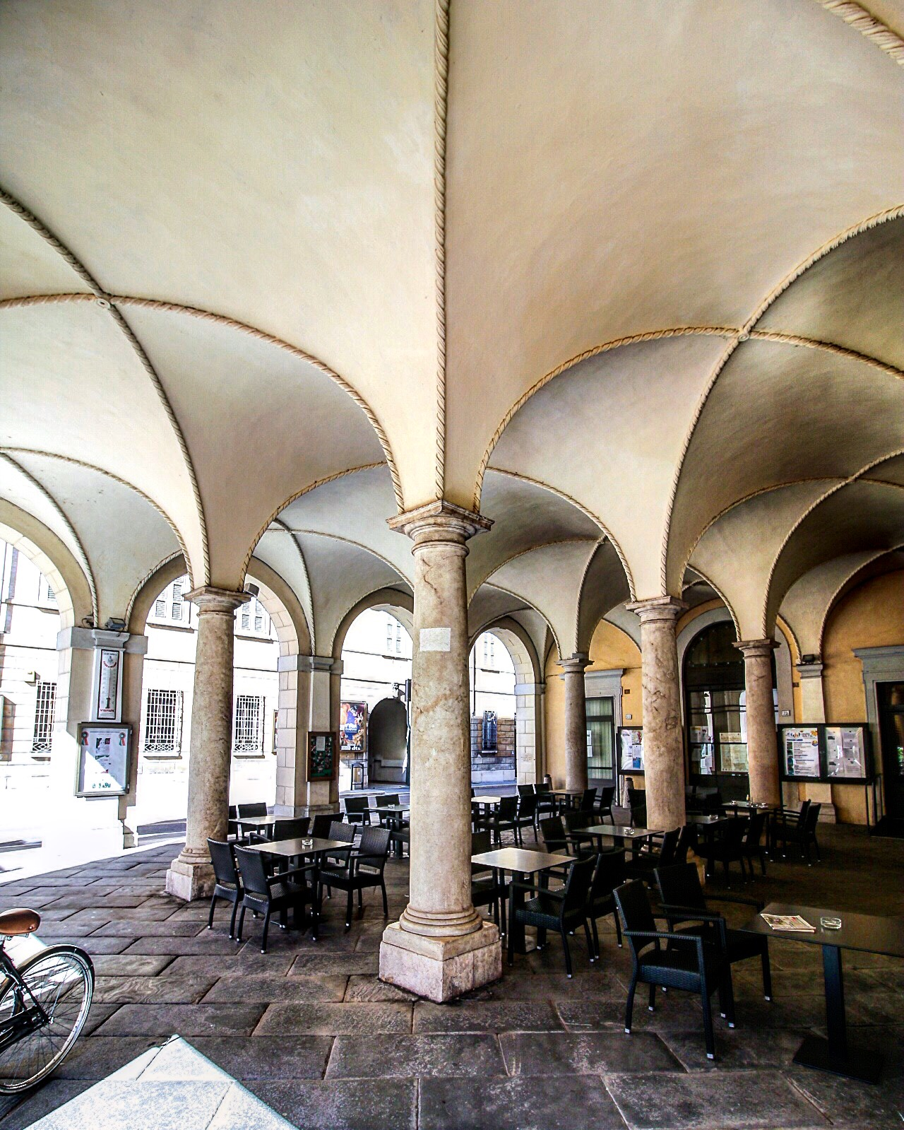 Loggia veneta di Asola. This is a photo of a monument which is part of cultural heritage of Italy.